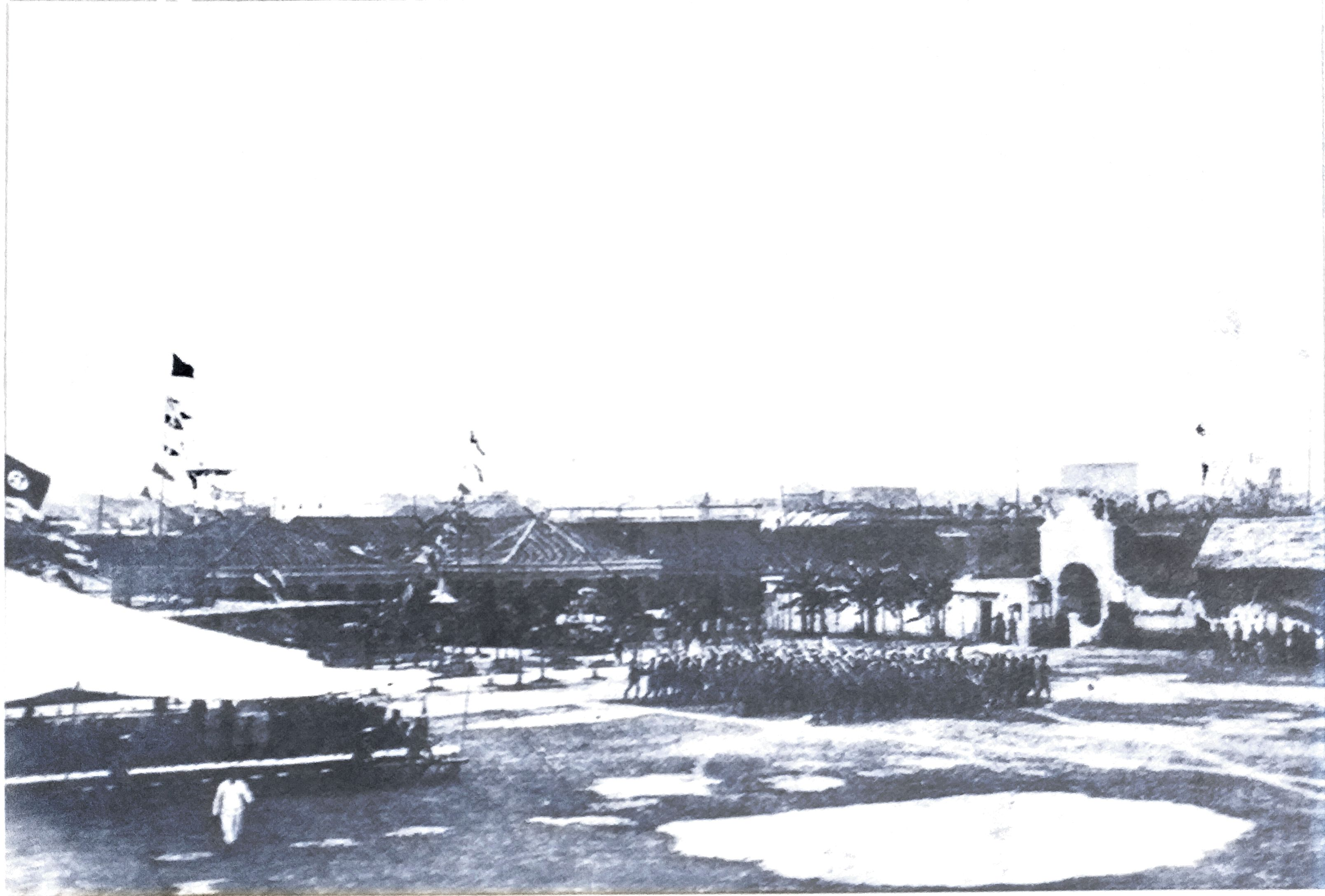 商团军操练场